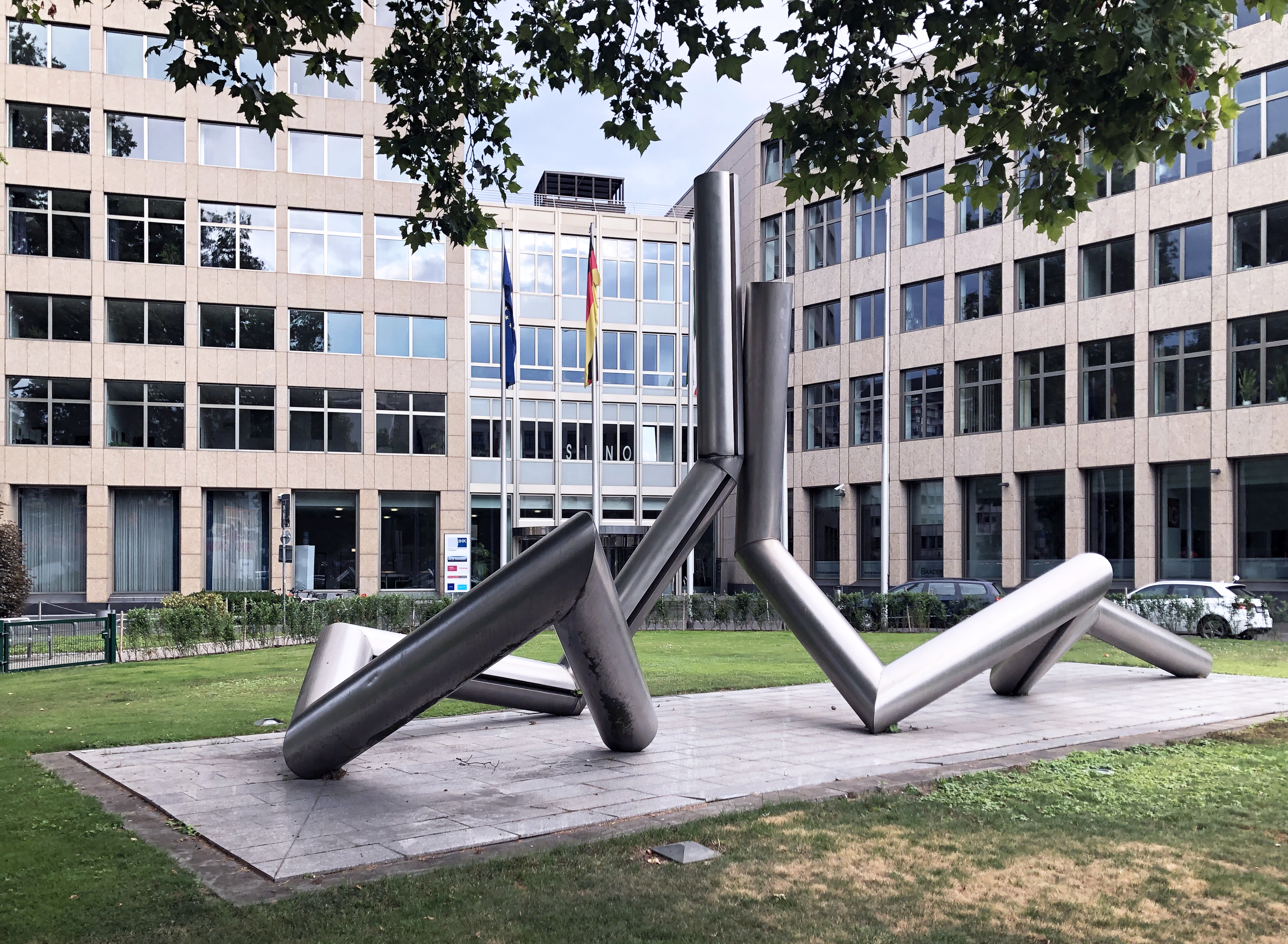 Raumsäule von Erich Hauser vor der Industrie- und Handelskammer, Ernst-Schneider-Platz, Düsseldorf-Stadtmitte